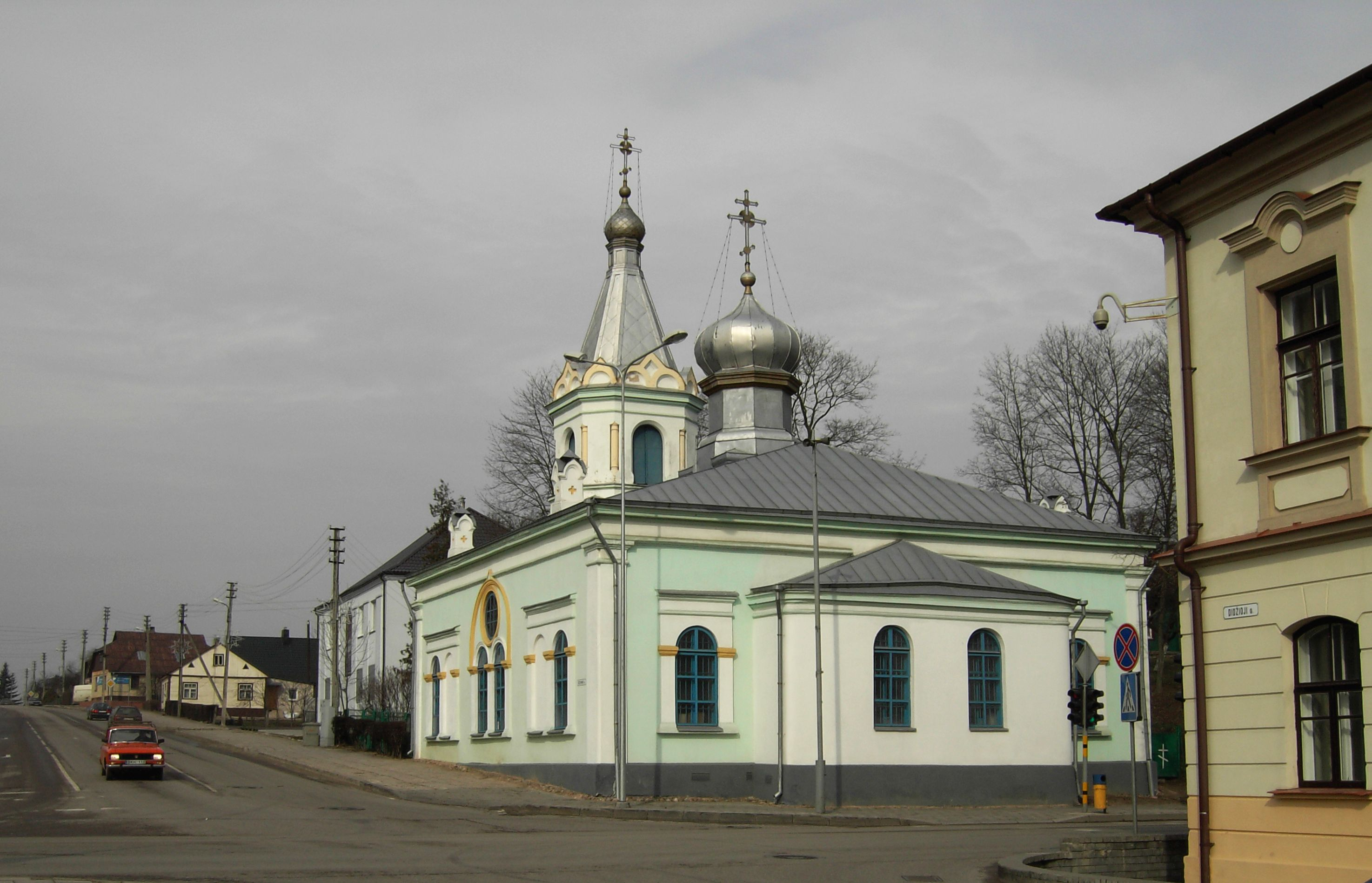 Cerkiew w Kiejdanach